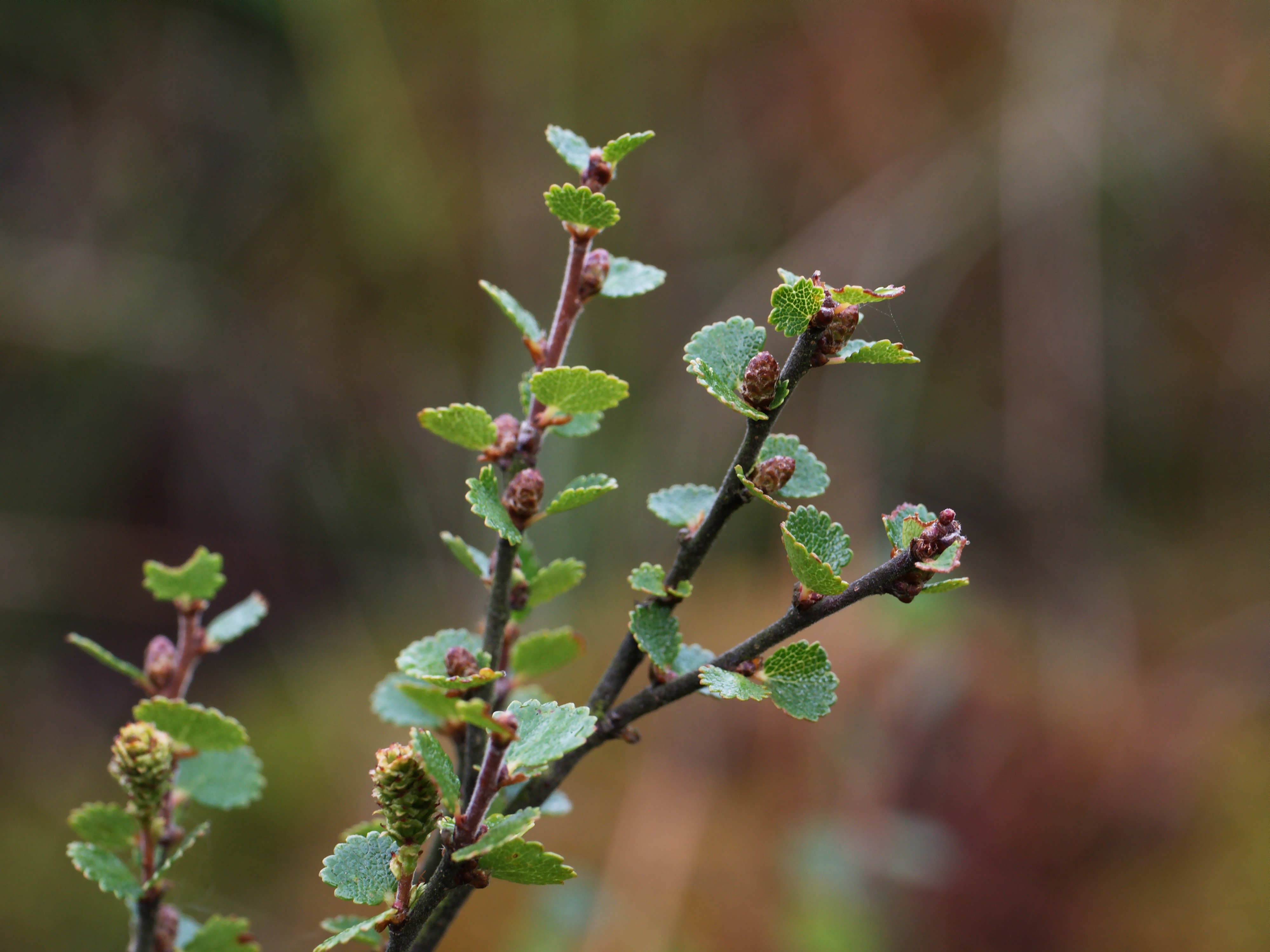 Das Hohes Venn und die Ardennen gehören nicht zum natürlichen Verbreitungsgebiet der borealen Zwerg-Birke. Die hier abgebildete Exemplar geht wahrscheinlich auf eine Ansalbung zurück !